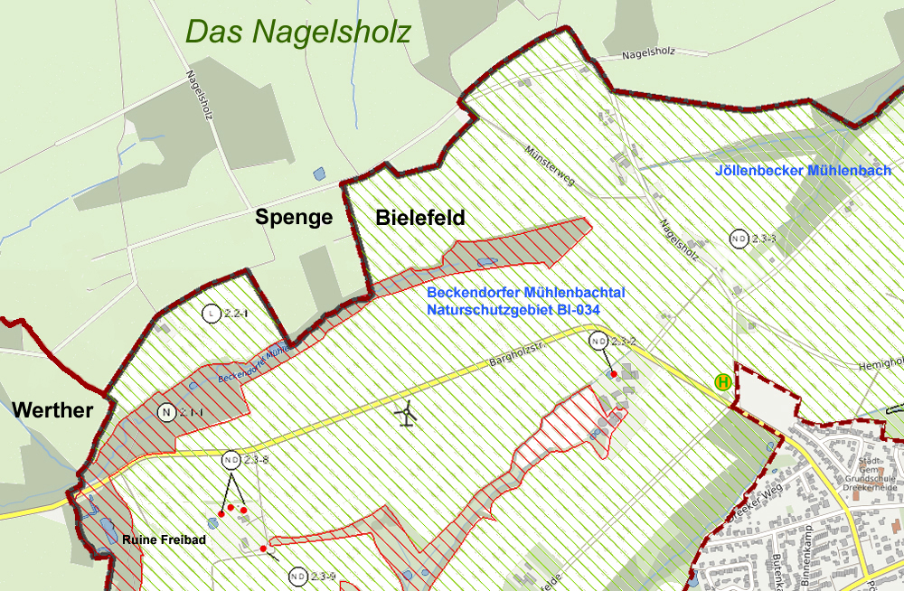 Landschaft Nagelsholz in der Grenzregion Spenge / Bielefeld / Werther